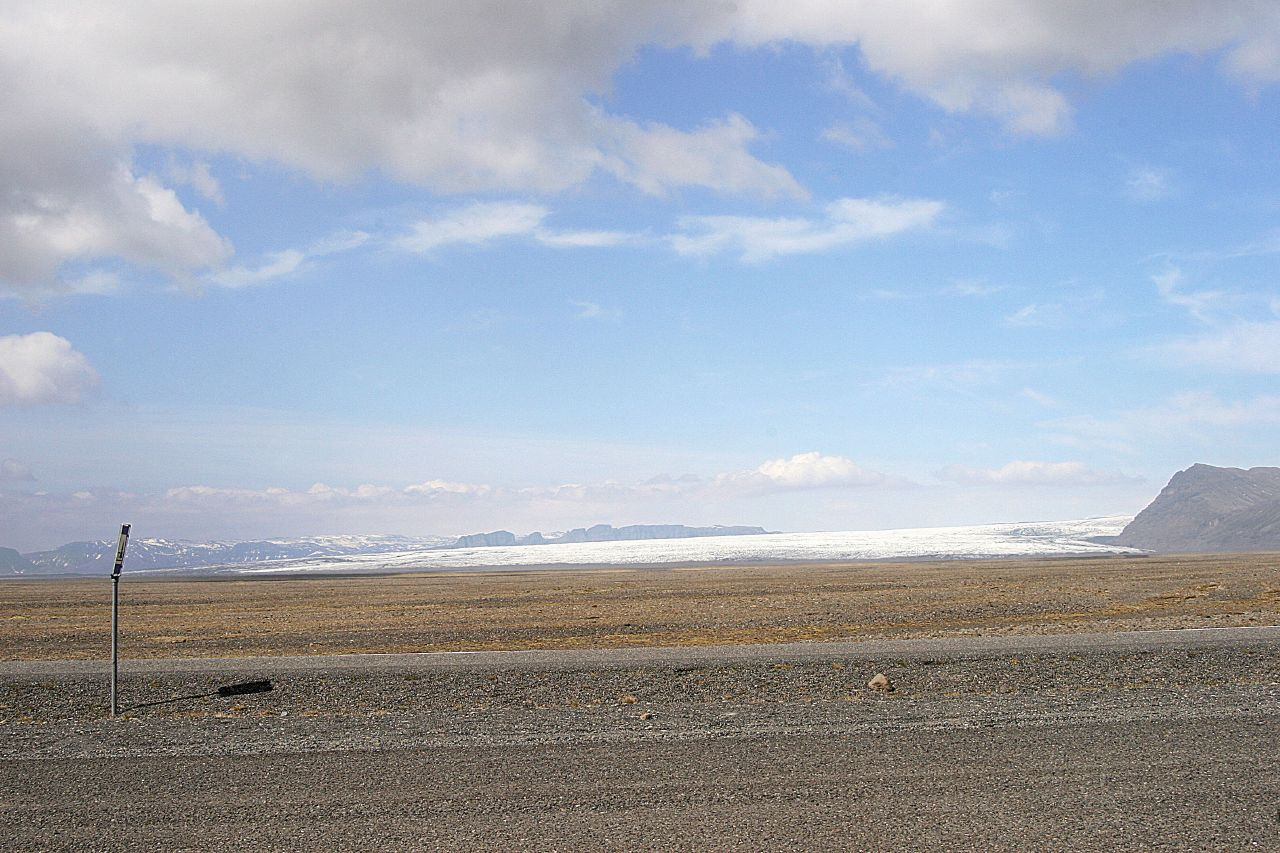 Island dag 2. Skaftafell National Park. Glaciären Skeiðarárjökull.